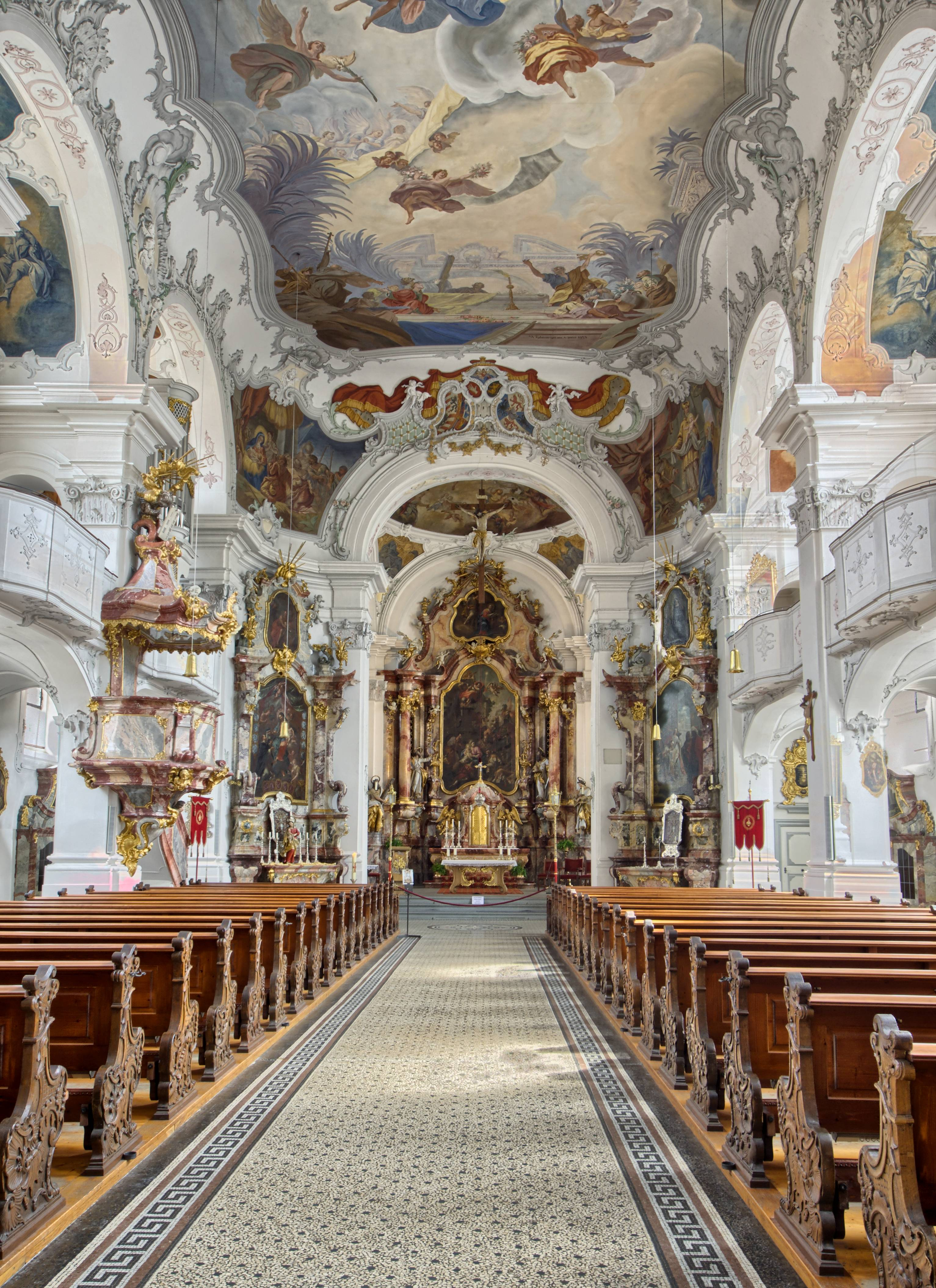 Bilder vom Münster in Lindau